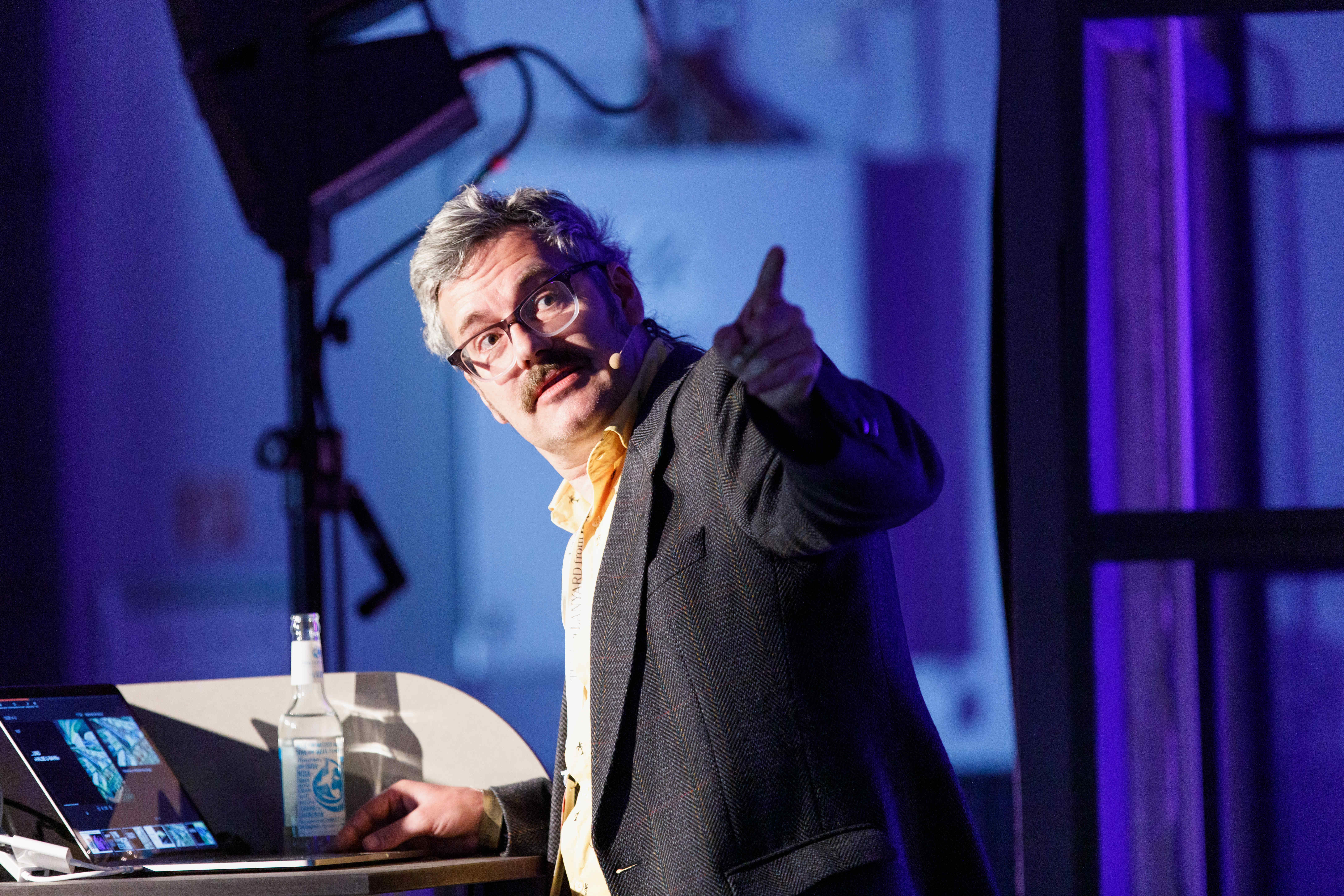 Talk: Technikvorhersagen vor 60 Jahren & was daraus wurde Speaker: Theobald Fuchs